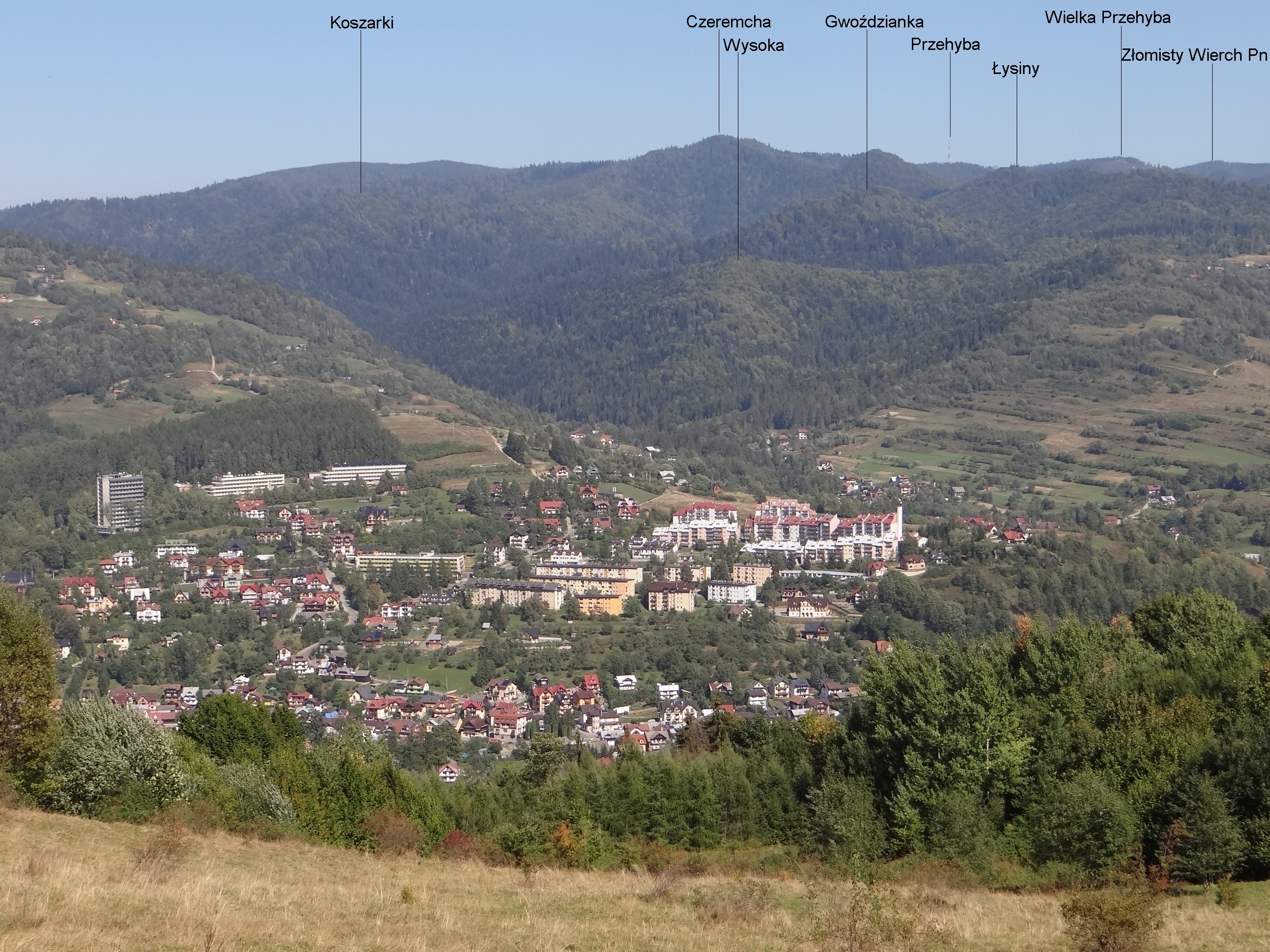 Widok z Szafranówki w Pieninach